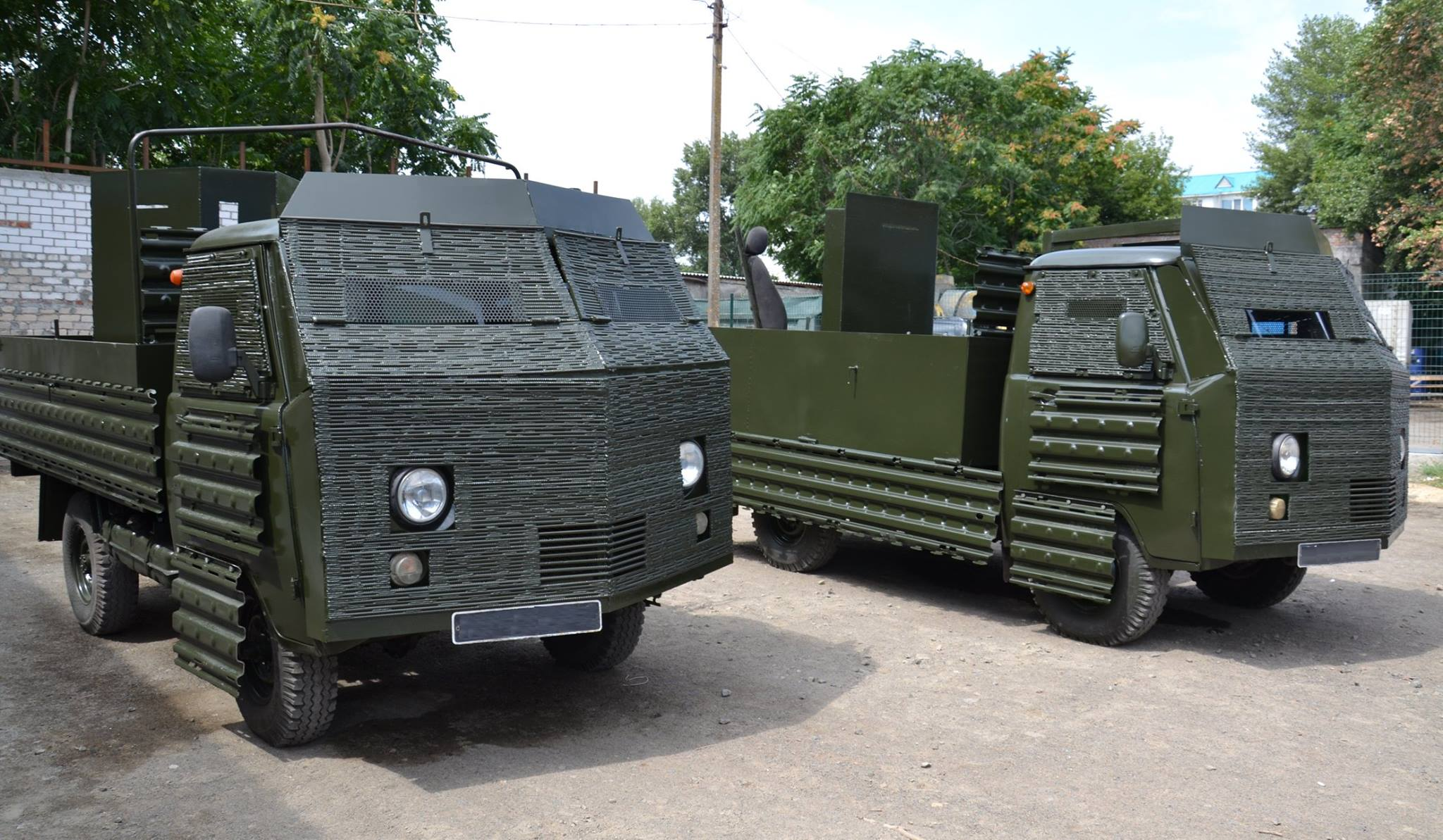 Бронированные УАЗы, Николаевский тепловозоремонтный завод